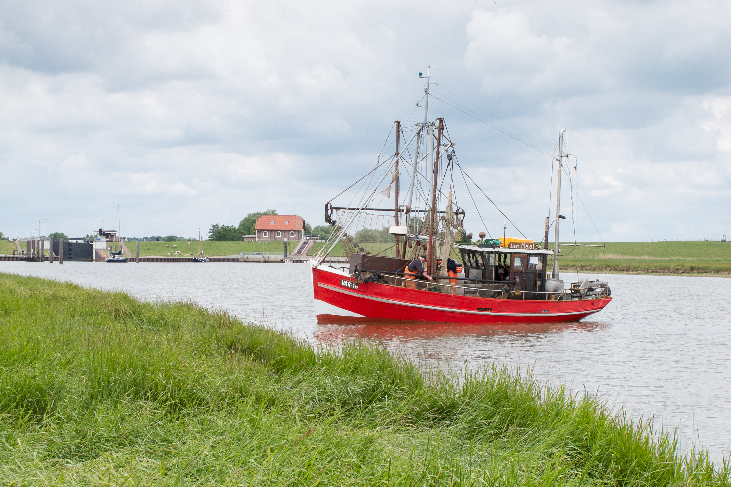 Krabbenkutter VAR 16 "Jan Maat" vor der Vareler Schleuse (2011)